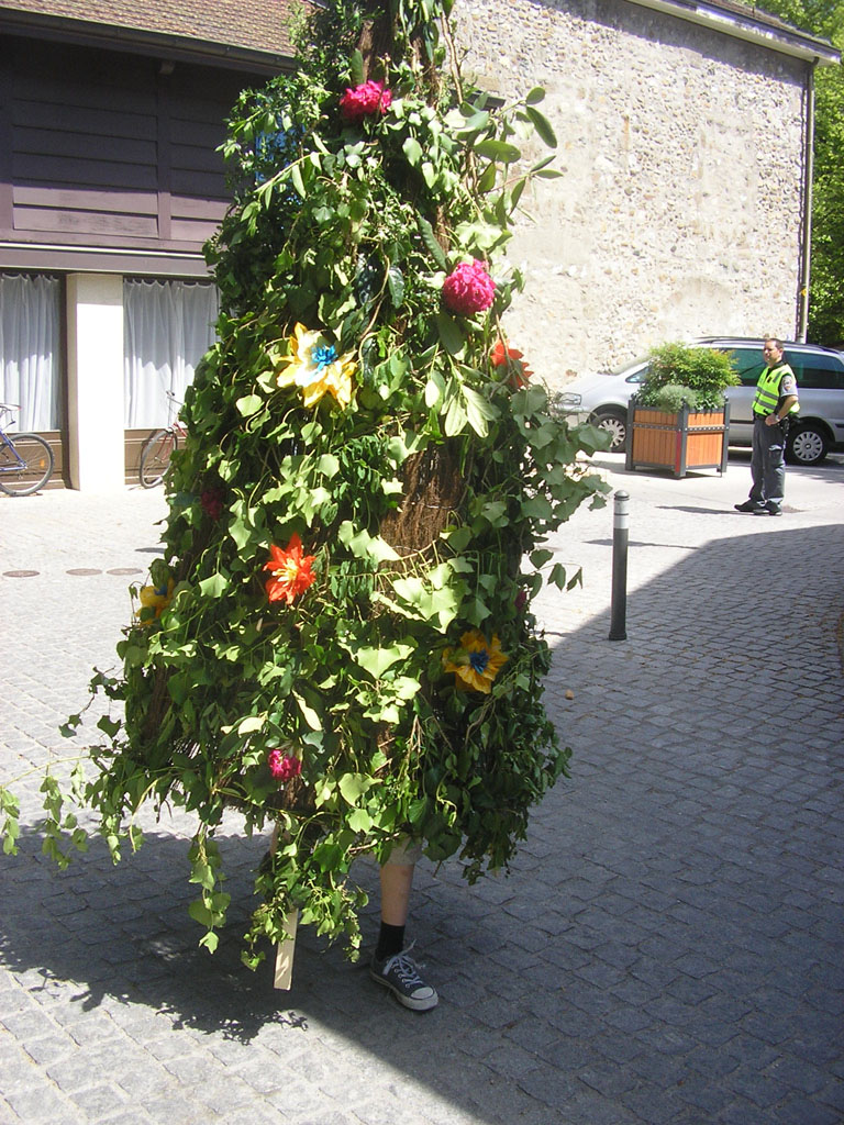 Cortège du « Feuillu » dans le Vieil-Onex, commune d'Onex à Genève. L'arbre végétal, porté par un enfant, représentant « Le Feuillu ». Réintroduction en 2011 de la tradition locale, perdue depuis la fin des années 1960.